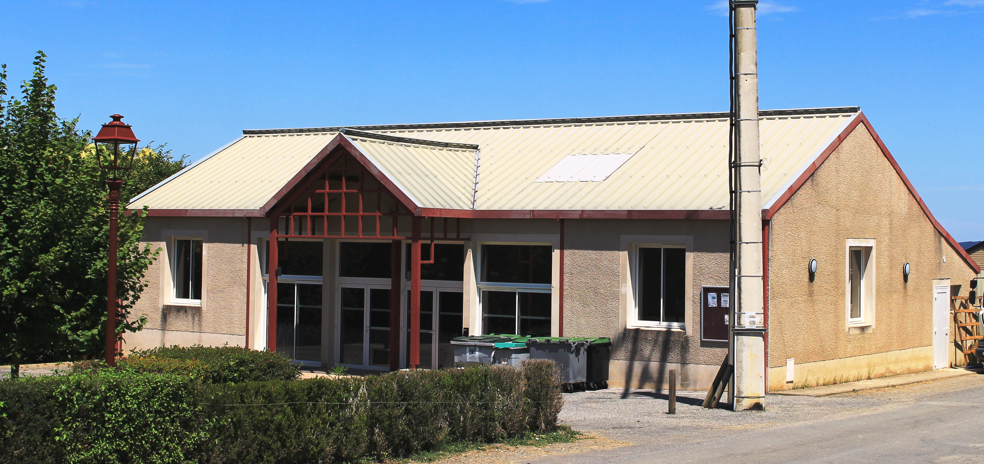 Salle des fêtes de Artiguemy (Hautes-Pyrénées)